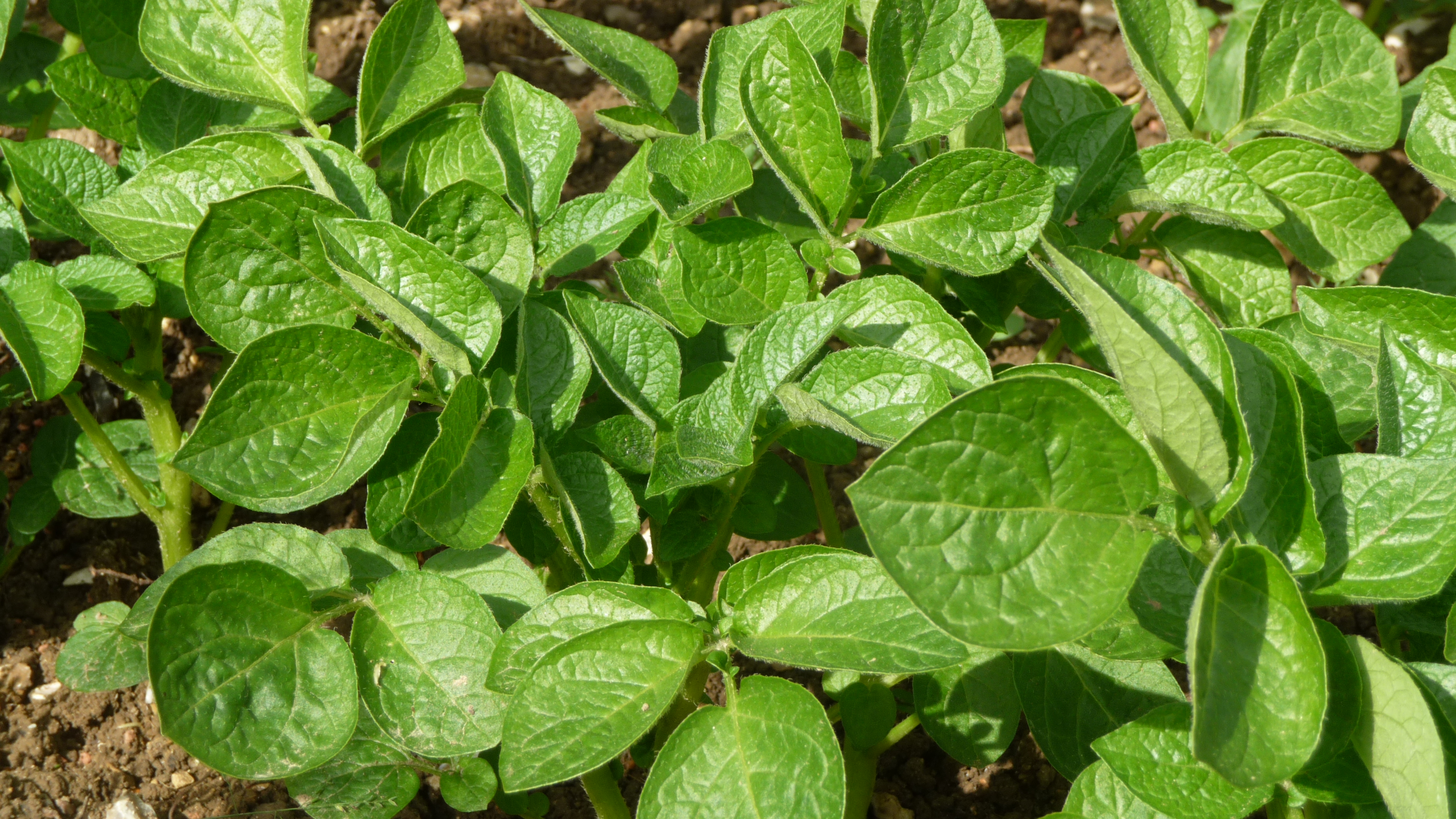 jeune plant de 'Belle de Fontenay', variété de pomme de terre (Solanum tuberosum)